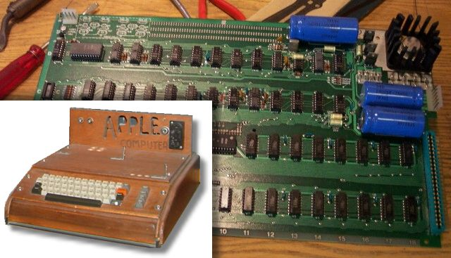 Apple I + Mainboard